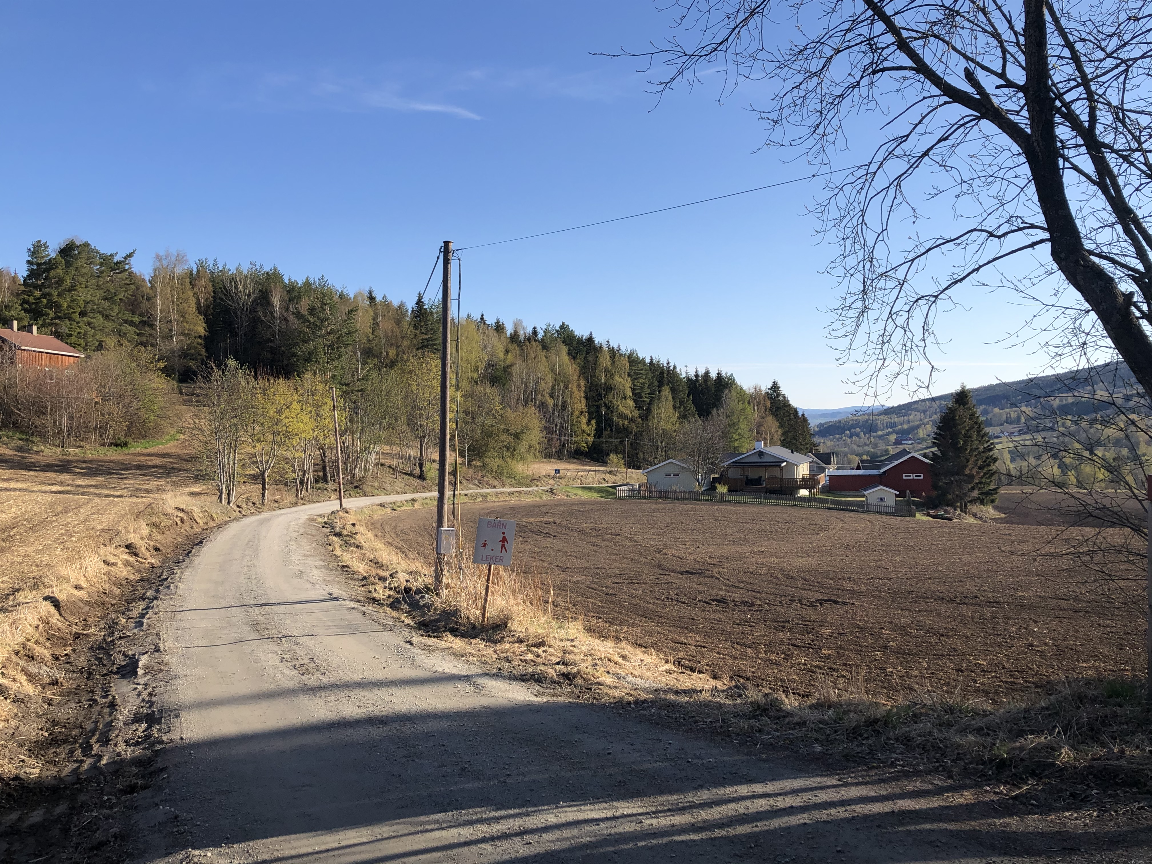 Torpveien, Ringerike